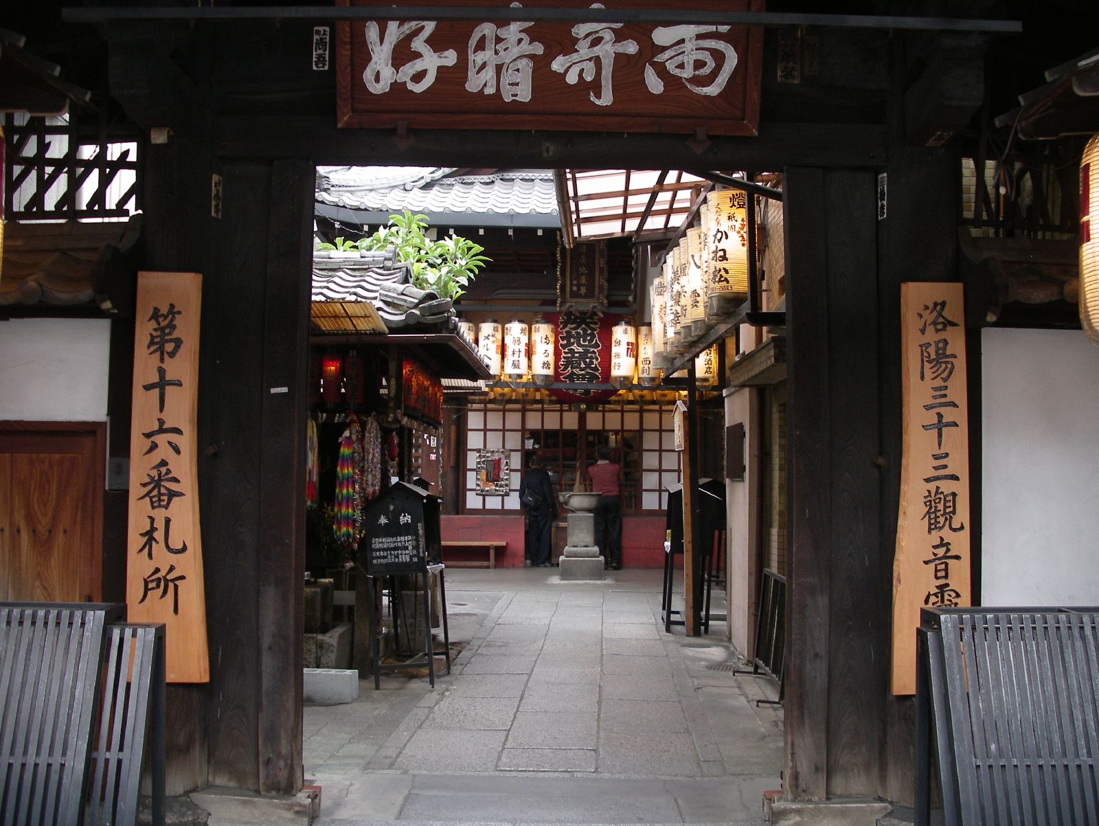 仲源寺（京都市東山区四条通大和大路東入ル祇園町南側585、京阪四条駅最寄り）